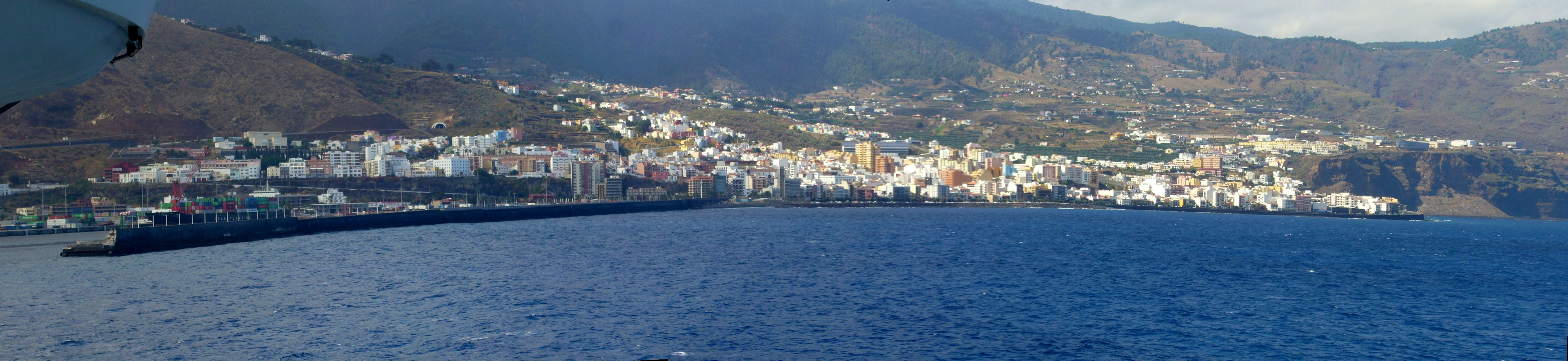 Panorámica de Santa Cruz de La Palma desde el mar